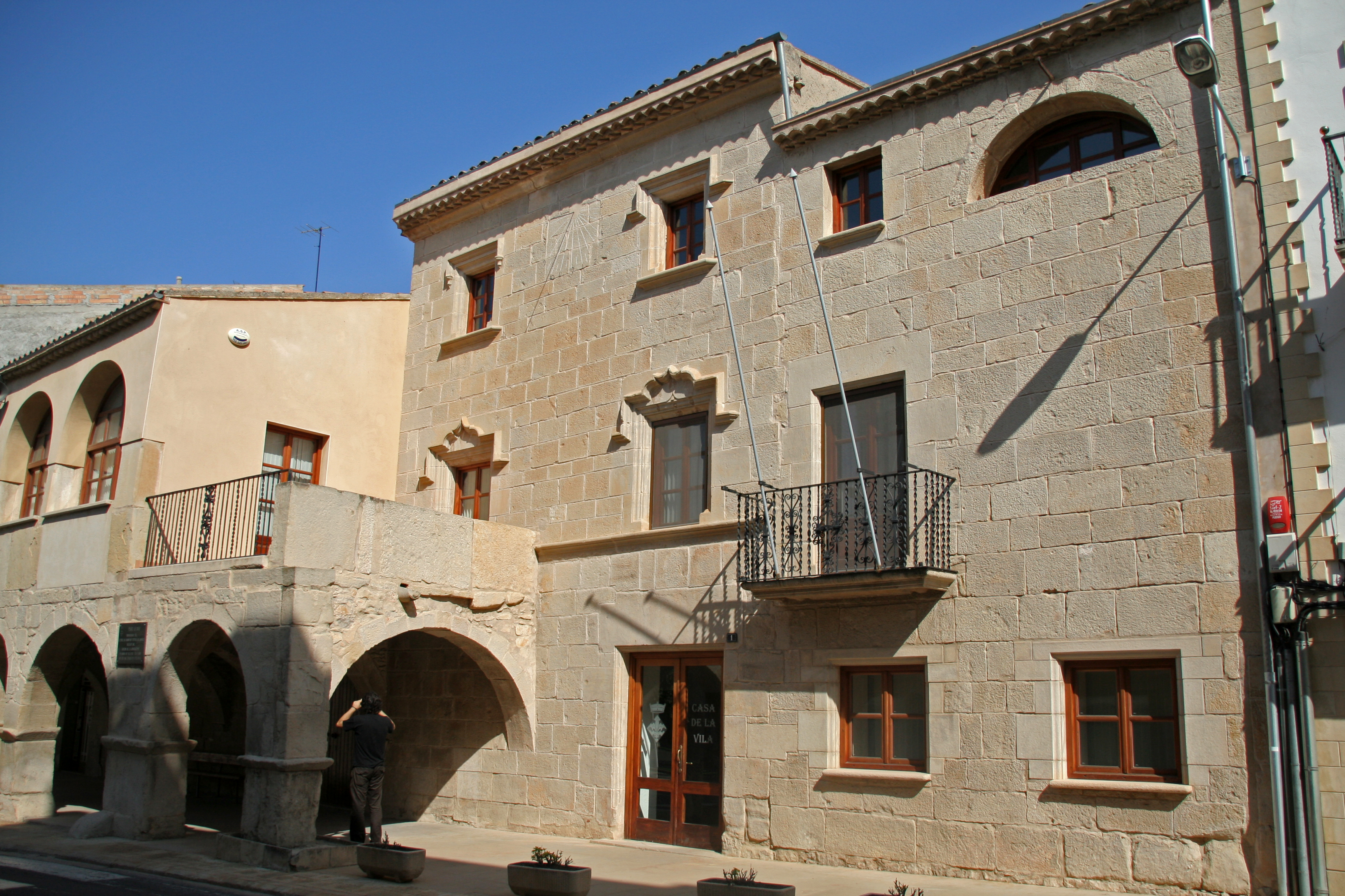 Ca l'Apotecari (Vilanova de Bellpuig)